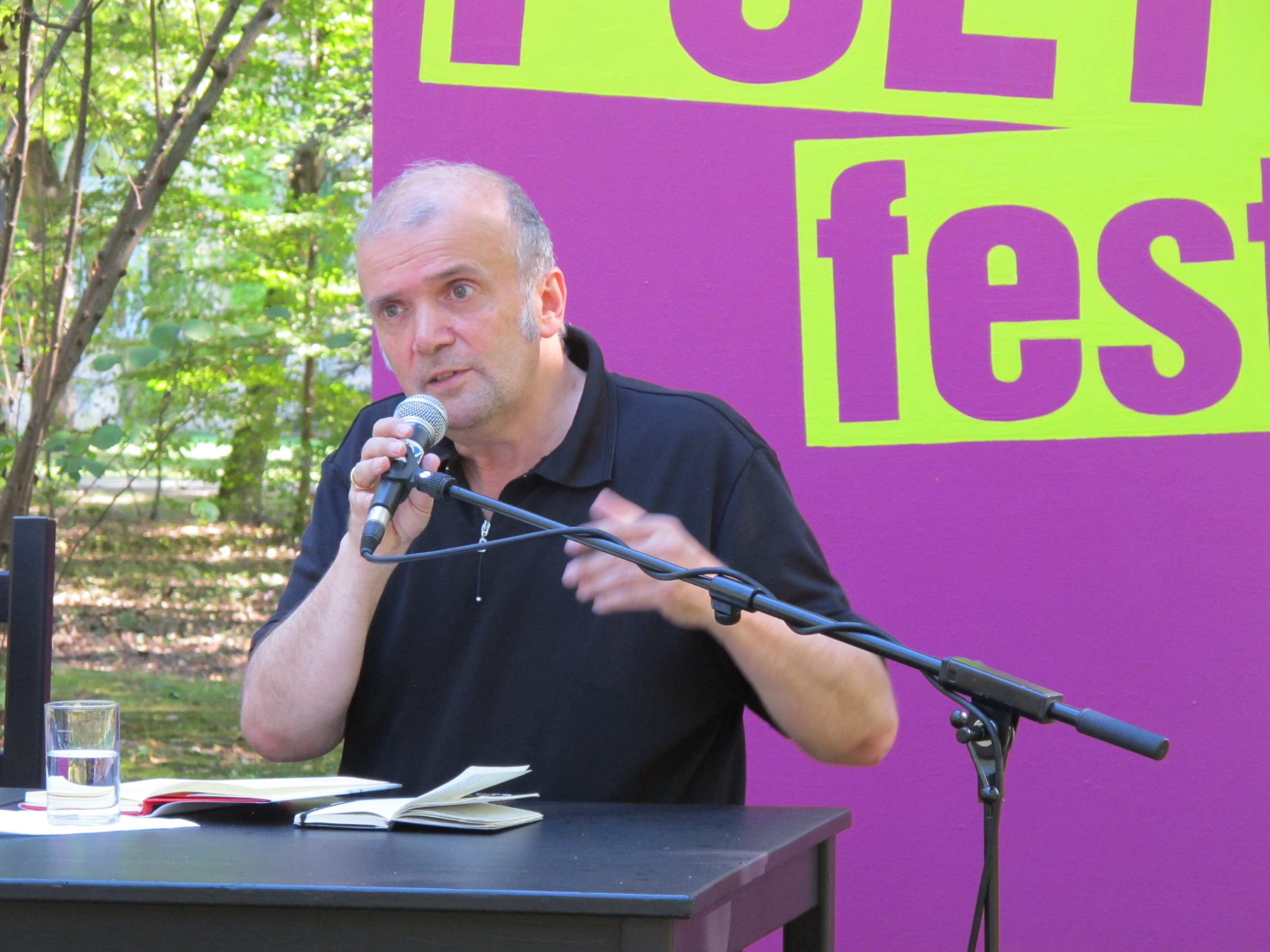 Michael Braun auf dem Erlanger Poetenfest 2015